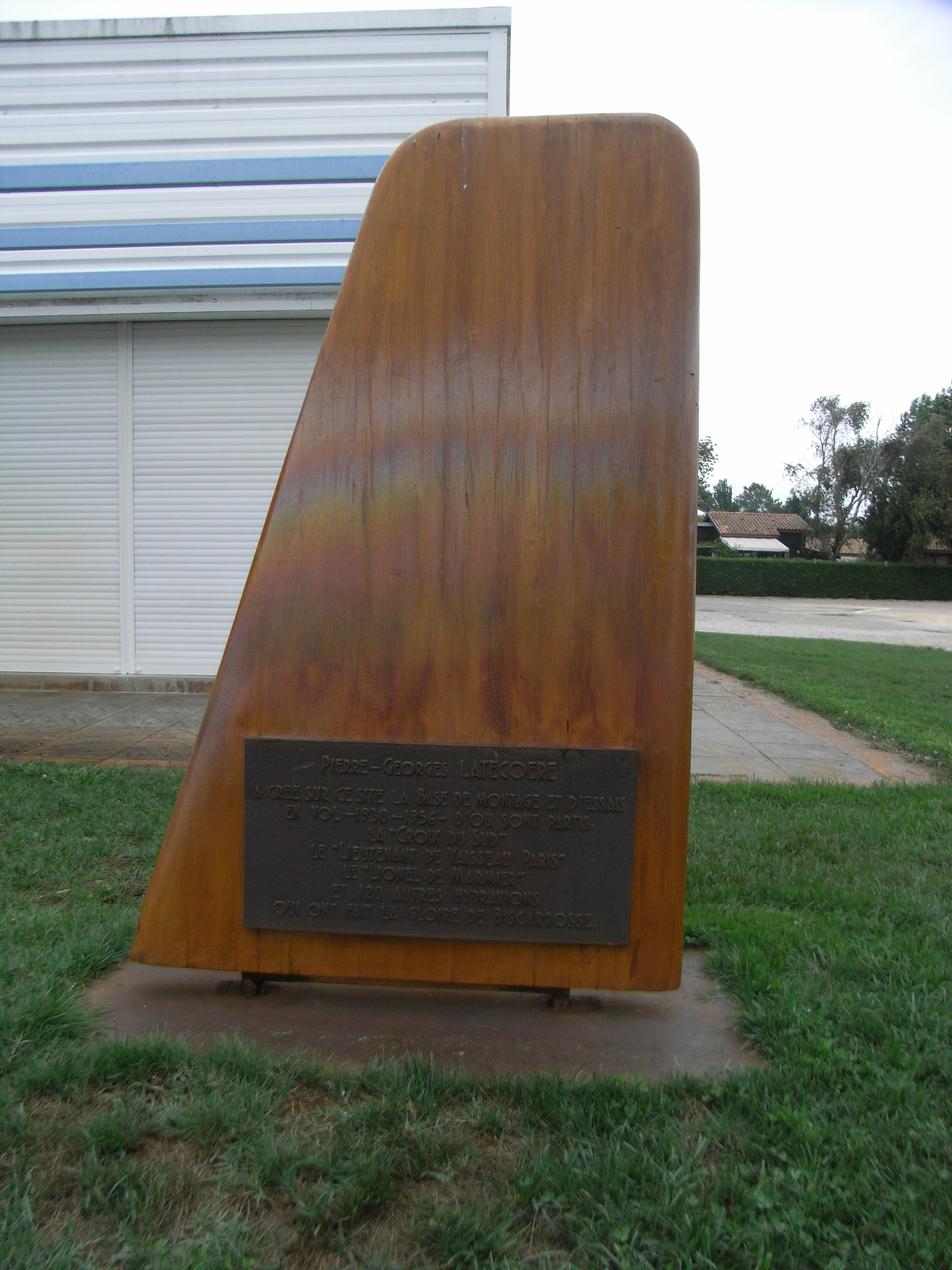 Stèle commémorative de Pierre-Georges Latécoère créateur de la base de montage et d'essais en vol d'hydravions à Biscarrosse (Landes).